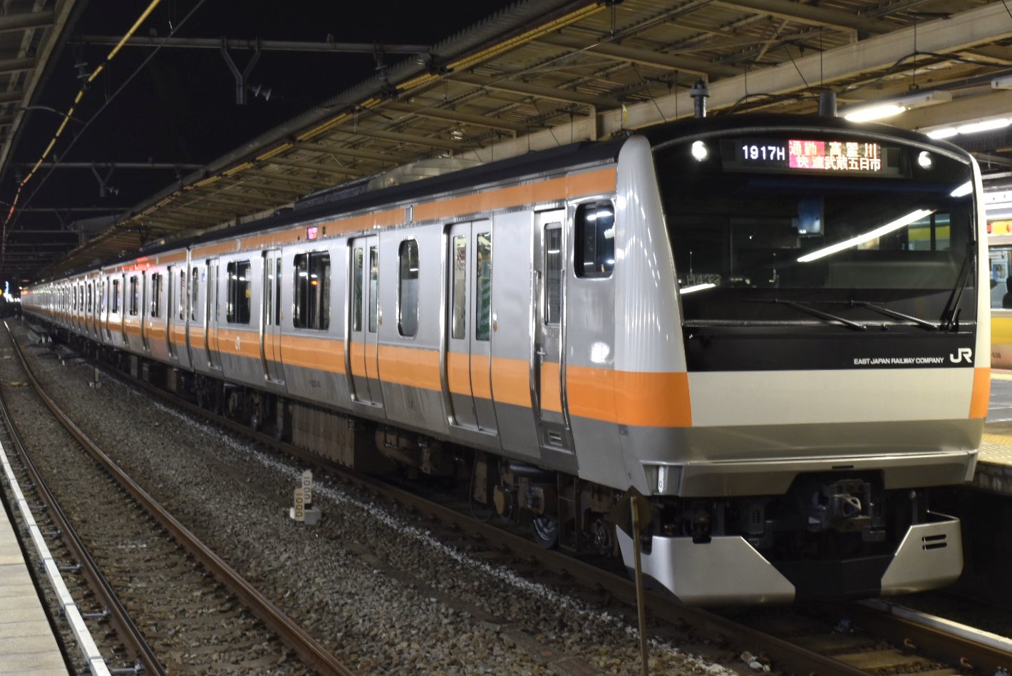 E233系0番台トタH43 @中央線中野駅